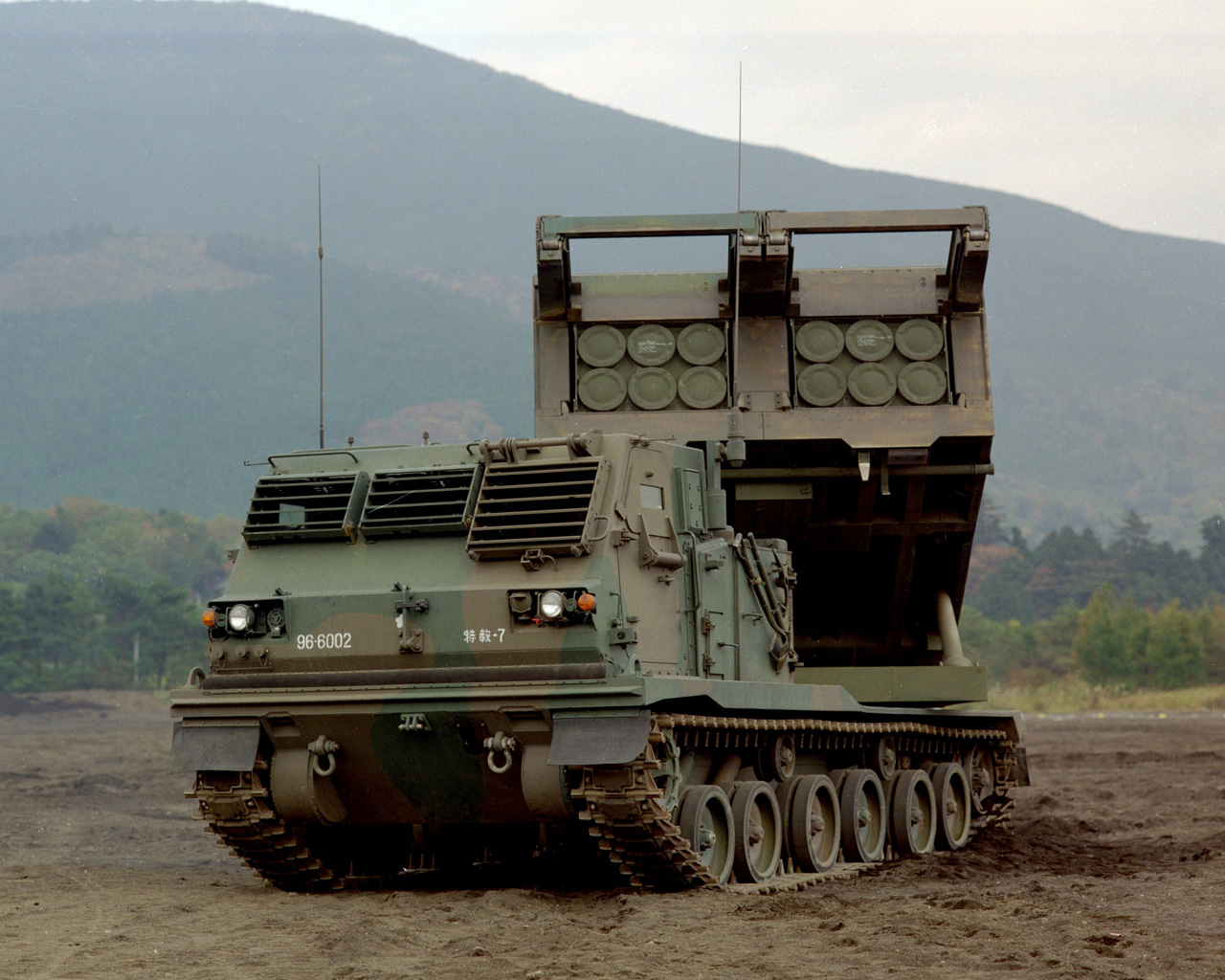 略称：MLRS 愛称：マルス ■ロケット弾 [全長]約3,900mm [直径]約227mm [重量]約306kg ■自走発射機 [乗員]3人 [全長]約7.0m [全幅]約3.0m [全長]約7.0m [全高]約2.6m [全備重量]約25t [最高速度]約65km/h [機関]500馬力、水冷4サイクルディーゼル [構成]自走発射機、指揮装置および弾薬車 [製作]IHIエアロスペース 野戦特科部隊に装備し、主として遠距離における砲兵部隊、装甲部隊、空挺・ヘリボン部隊、上陸用舟艇等の広域目標を瞬間的に撃破することを目的としている。（略称 MLRS）